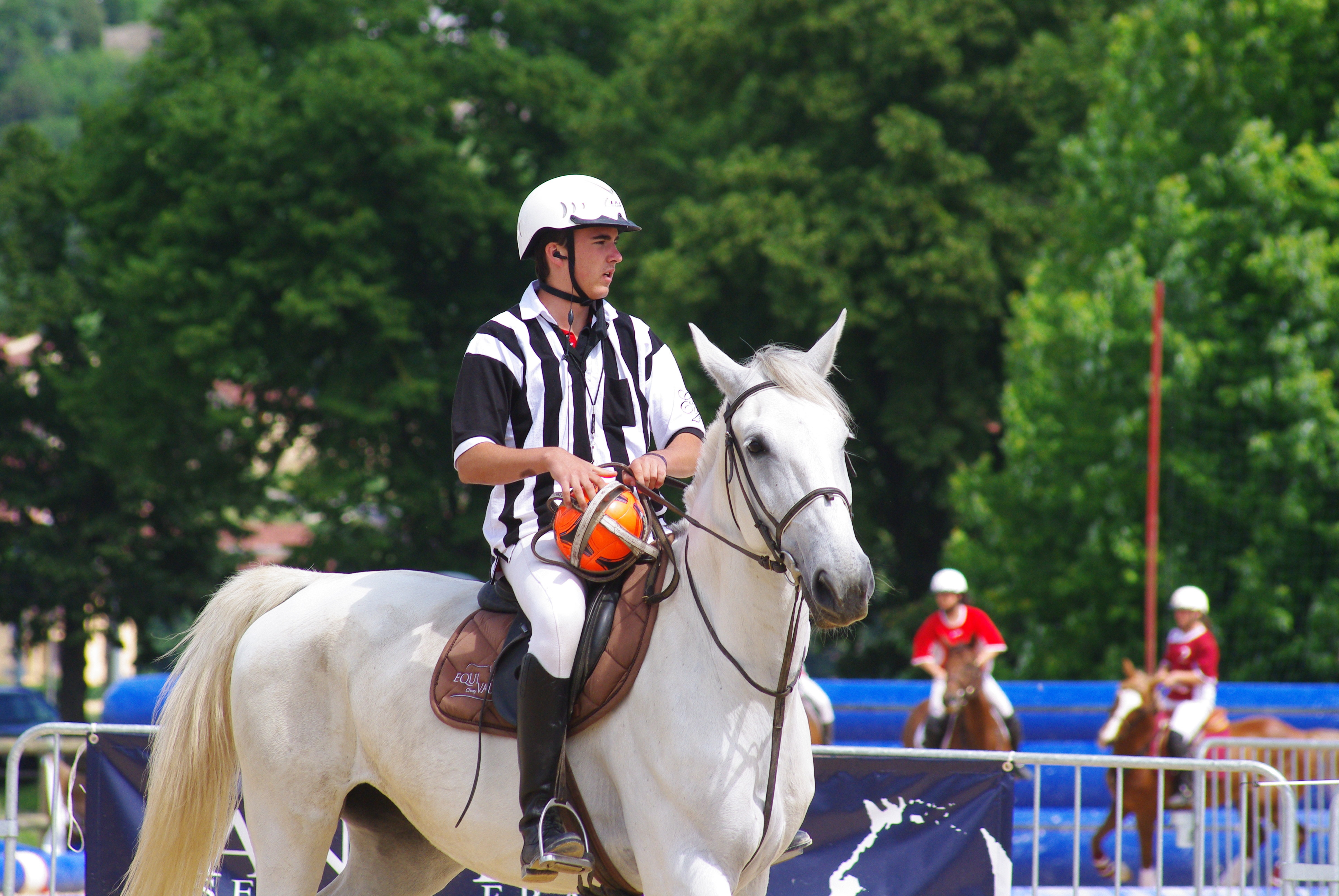 Championnats de France de horseball féminin, Cluny.